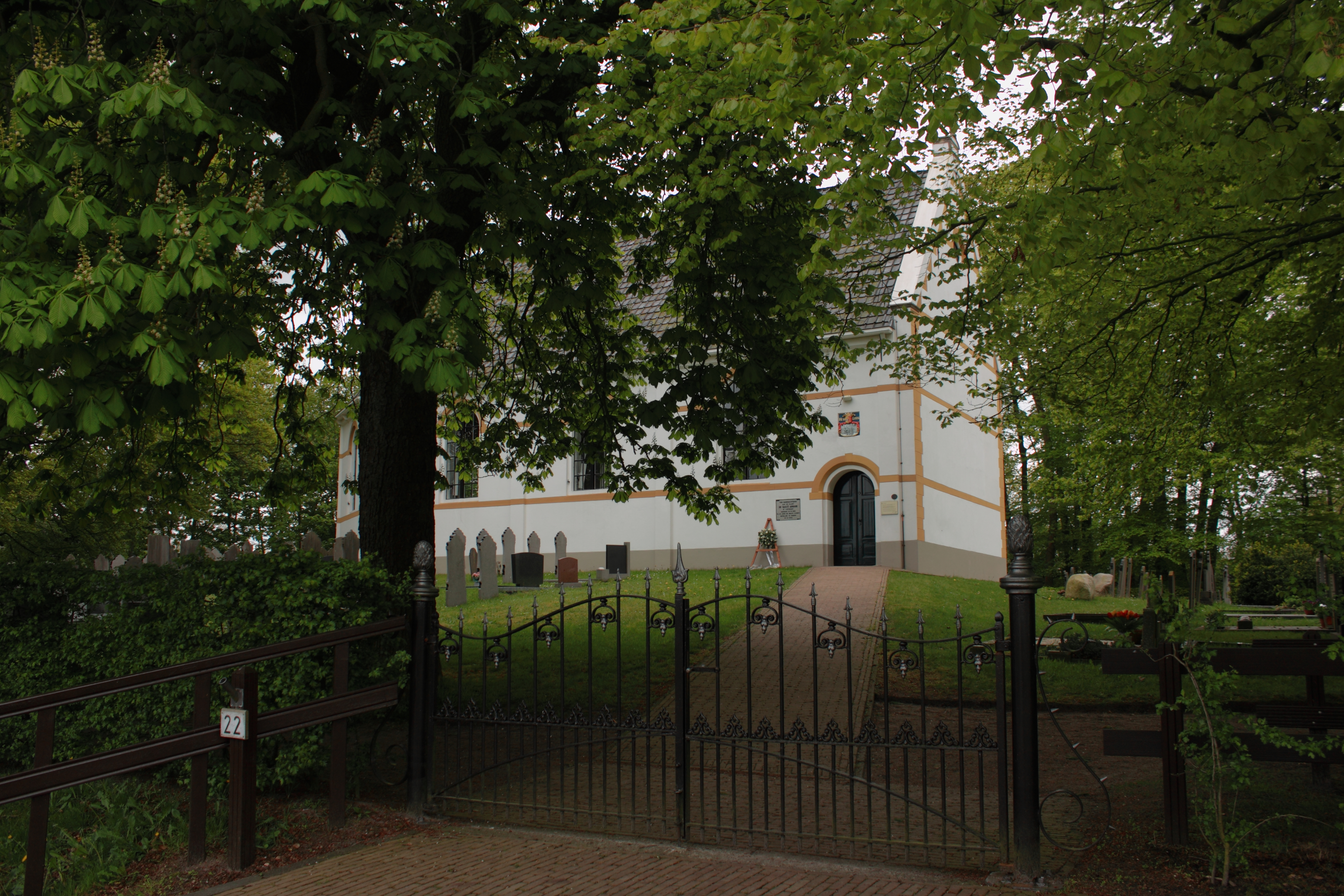 Witte Kerk Hemrik